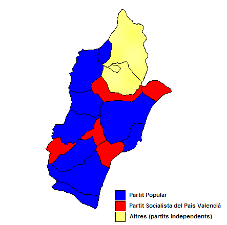 Partits polítics més votats als municipis de la Plana Alta (País Valencià) després de les eleccions municipals de 2007.